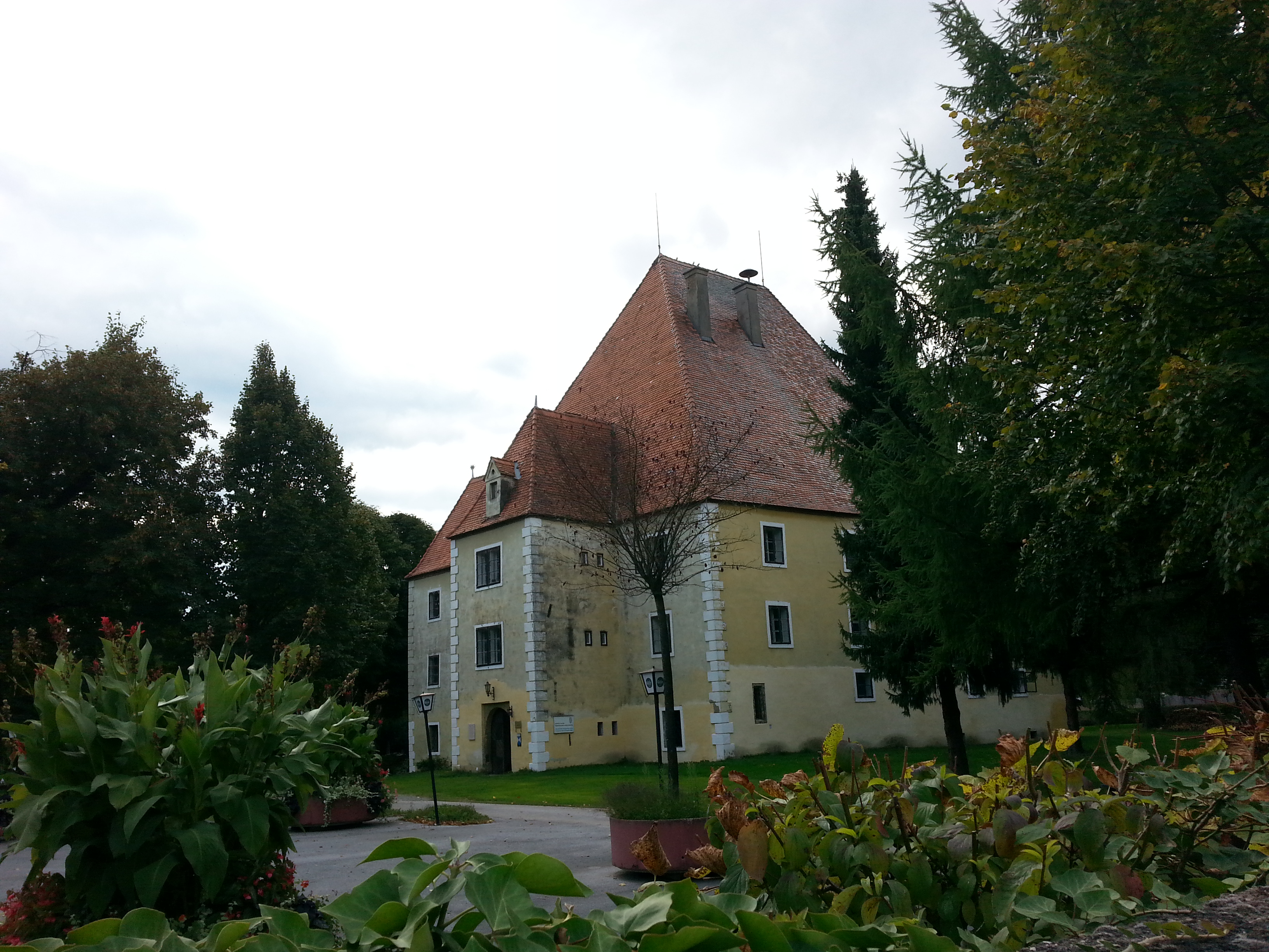 Schloss Alt-Kainach mit Schlosskapelle This media shows the Geschützter Landschaftsteil in Styria with the ID GLT_1536.